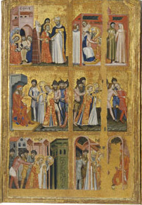 Retaule de sant Vicenç del mestre de Estopanyà, cap a 1350-1370.